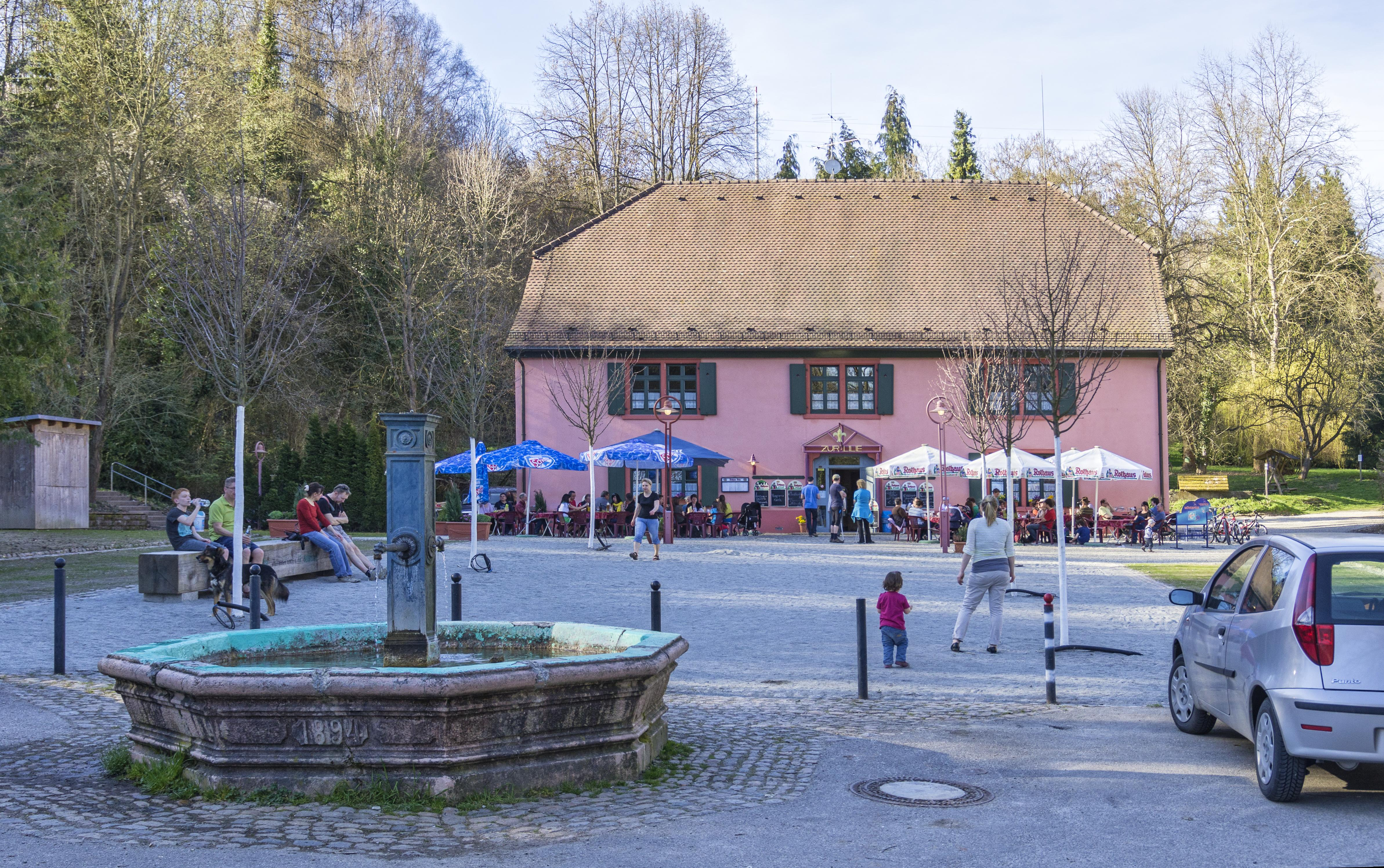 Bilder aus Ihringen am Kaiserstuhl Der Eingangsbereich des Arboretums mit dem Lilienhof